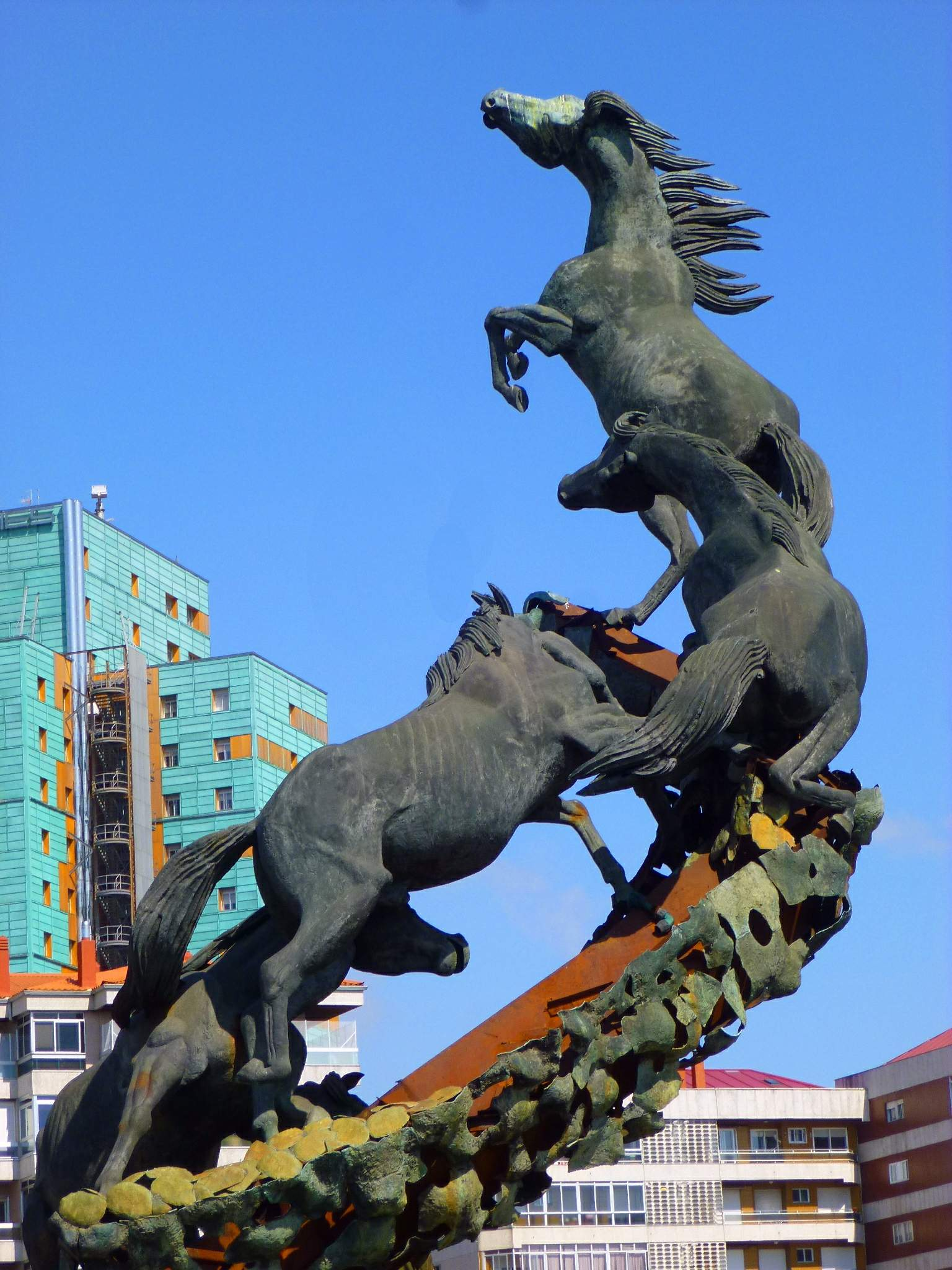 Vigo - Rotonda de la Plaza de España, Monumento a los Caballos